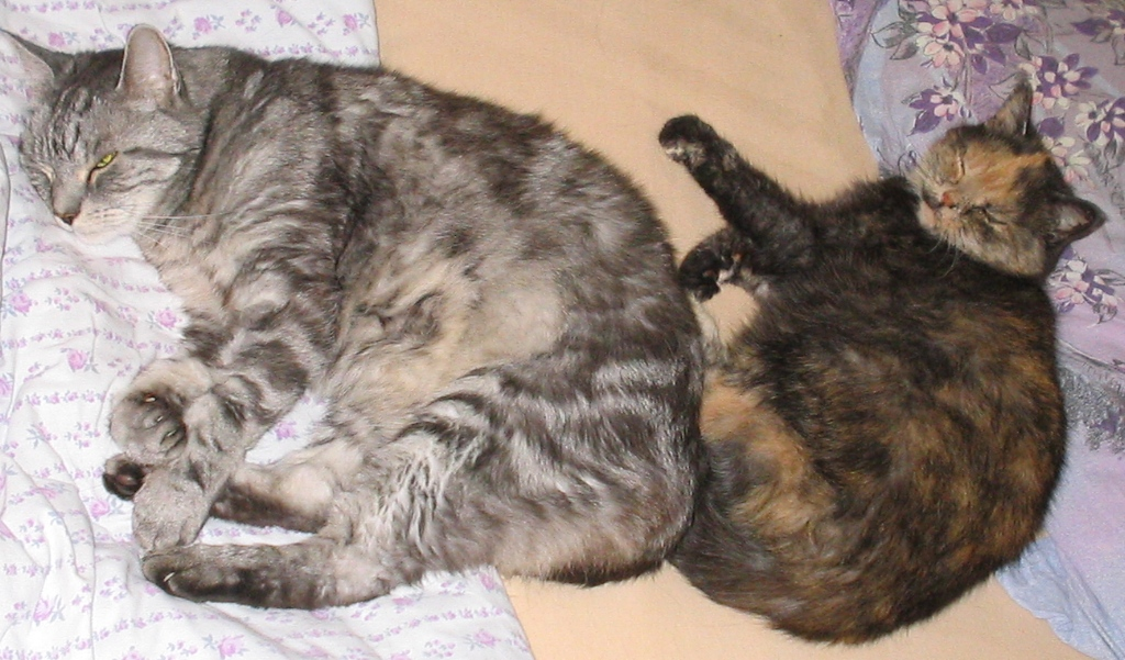 "Befreundete" Katzen beim Schlafen